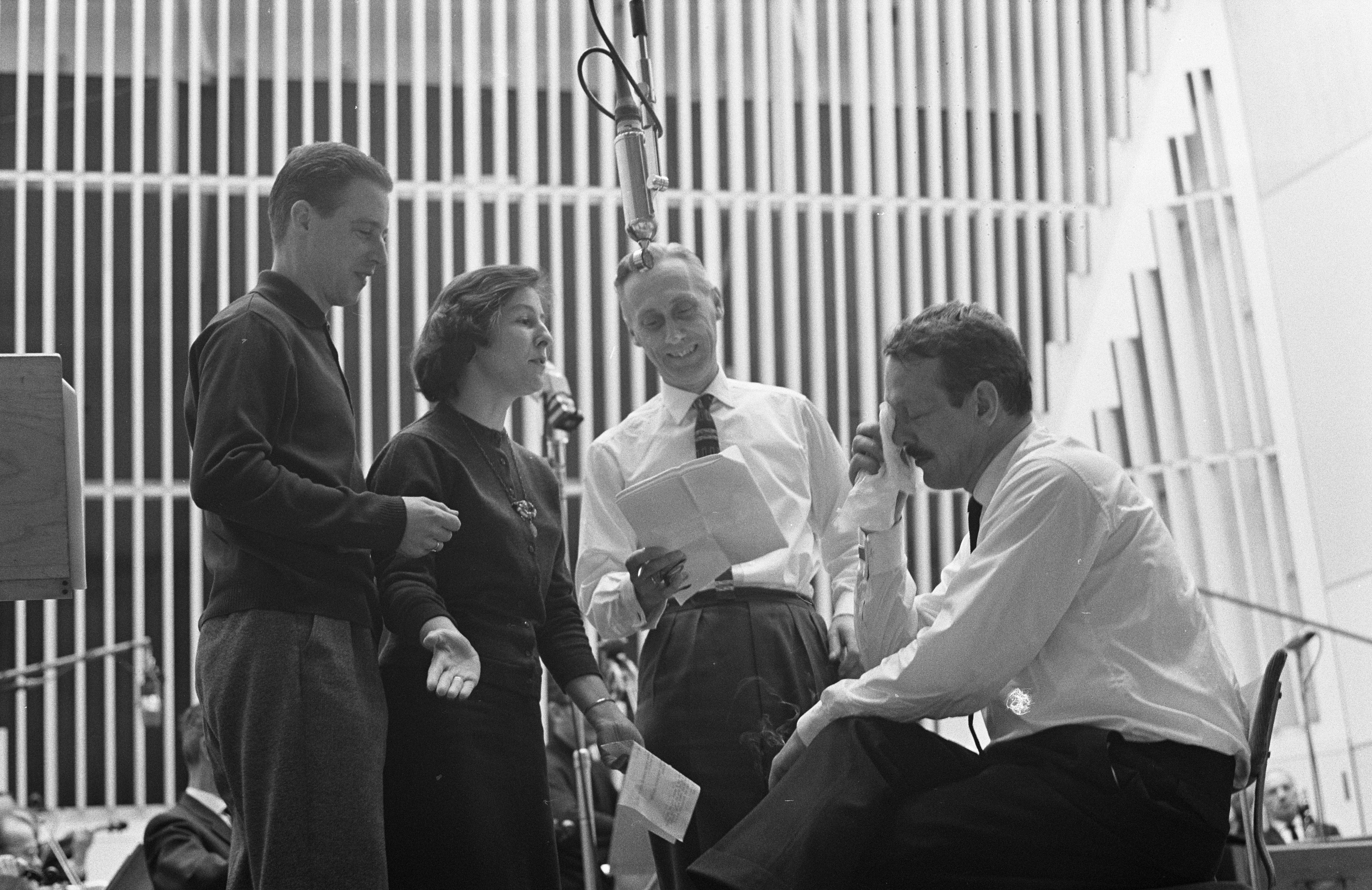 Collectie / Archief : Fotocollectie Anefo Reportage / Serie : [ onbekend ] Beschrijving : Opname van afscheidsconcert voor Jos Cleber . V.l.n.r.: Lex Braamhorst , Ilse Wessel, Jan Boots en Jos Cleber. Datum : 21 januari 1962 Trefwoorden : concerten Persoonsnaam : BOOTS JAN, Ilse Wessel, Jos Cleber Fotograaf : Rossem, Wim van / Anefo Auteursrechthebbende : Nationaal Archief Materiaalsoort : Negatief (zwart/wit) Nummer archiefinventaris : bekijk toegang 2.24.01.05 Bestanddeelnummer : 913-4215 Reacties Geplaatst door Maaike op 17 juni 2014 - 15:37. AVRO radio Plaats: Hilversum, Noord-Holland